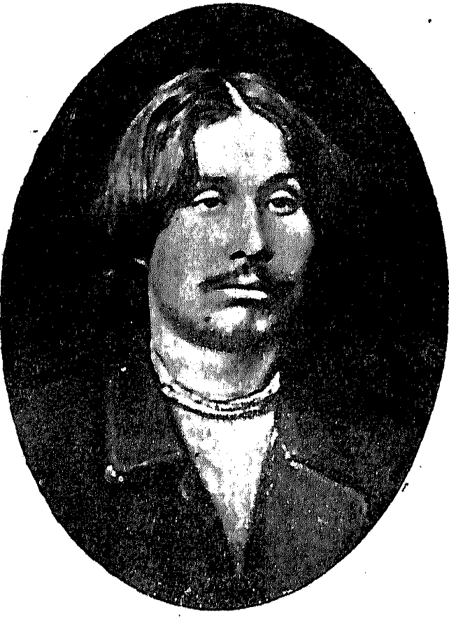 Крижанівський Никанор Федорович: фотографія